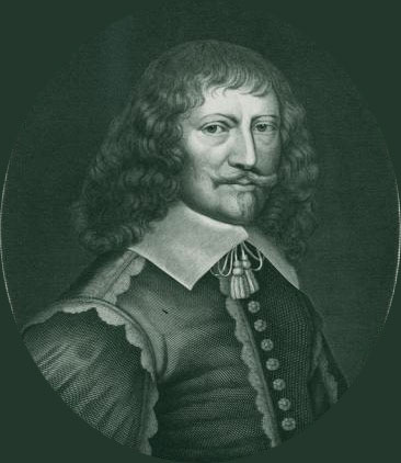 gravure van Adriaan Clant (1599-1665)